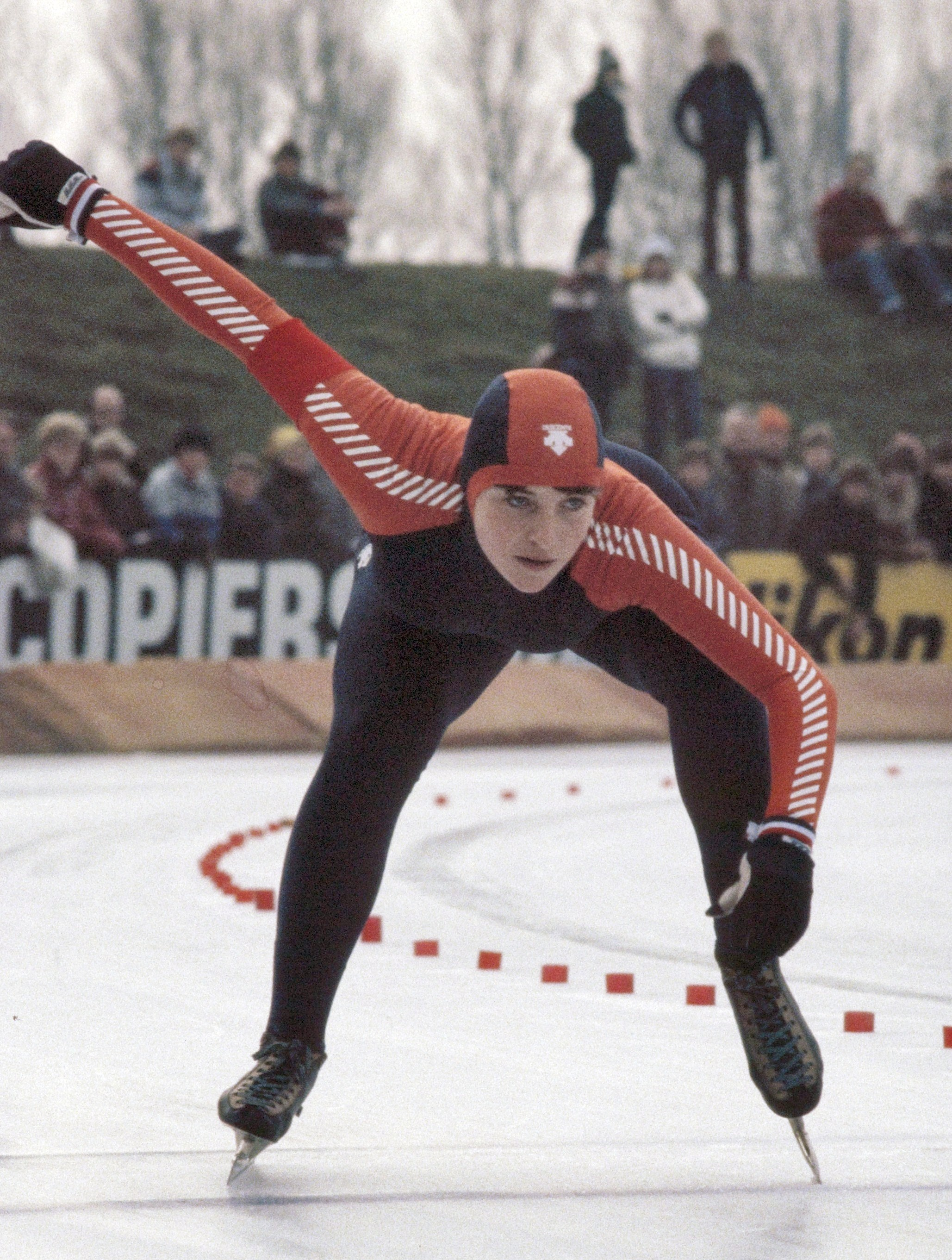 Wereldkampioenschappen schaatsen sprint in Alkmaar. Yvonne van Gennip bij de start van de 500 meter